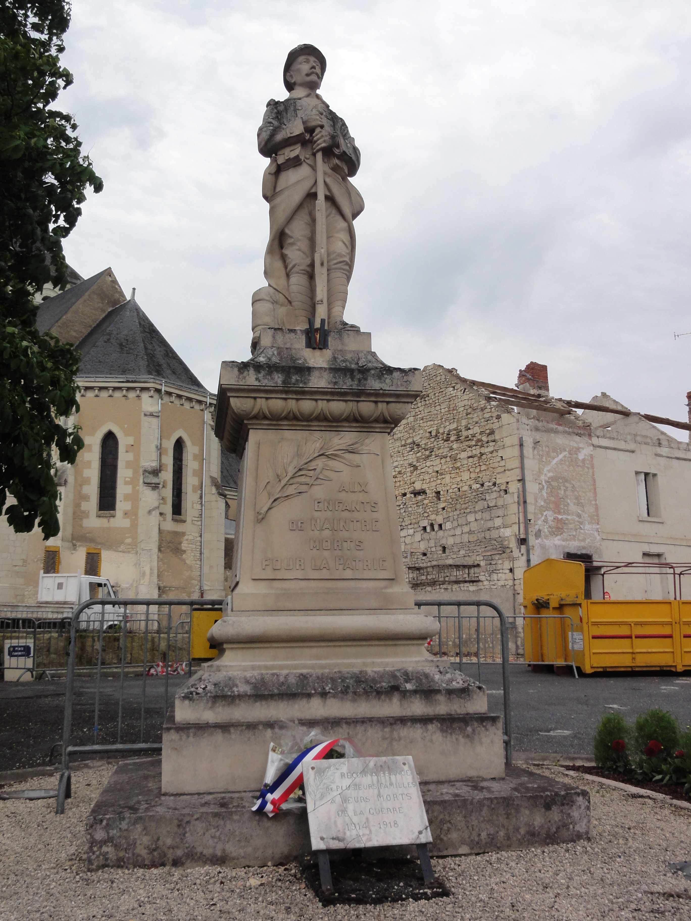 Naintré (Vienne) Monument aux morts